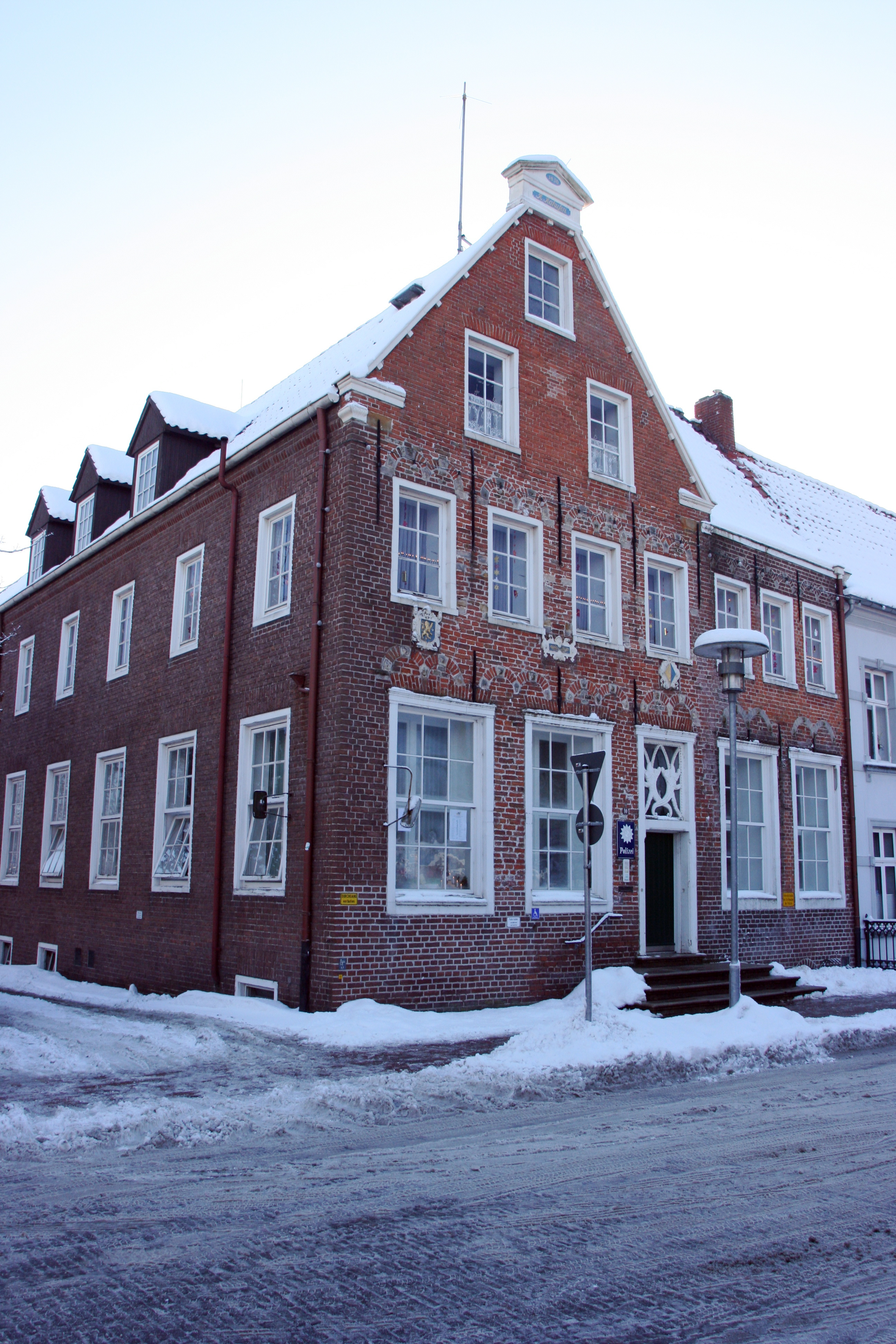 Polizeiwache in Norden (Ostfriesland)